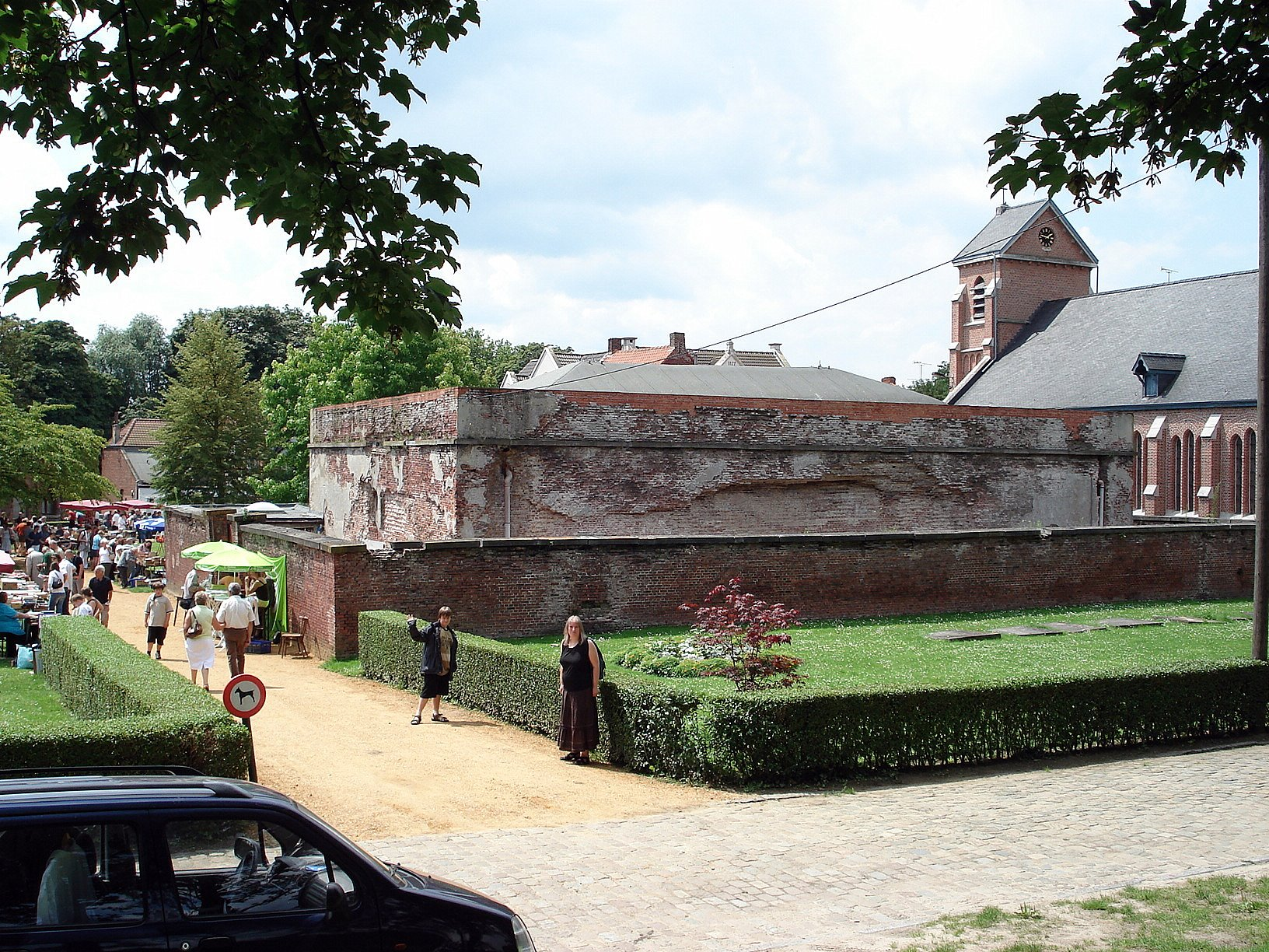 Lillo (Anvers, Belgique): magasin à poudre et église St.-Benoît. Lillo-Fort (Antwerpen): buskruitmagazijn en St.-Benedictuskerk.